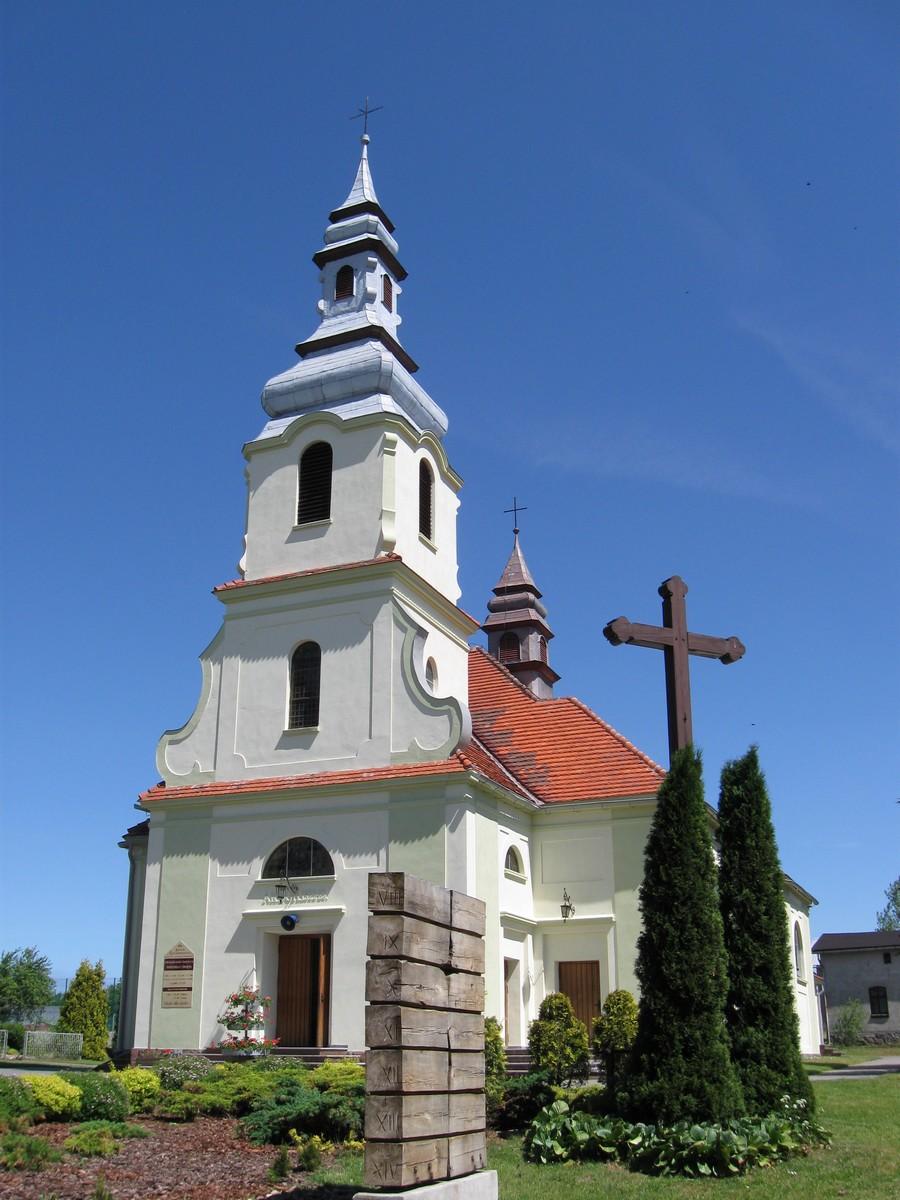 Kościół w Dziemianach